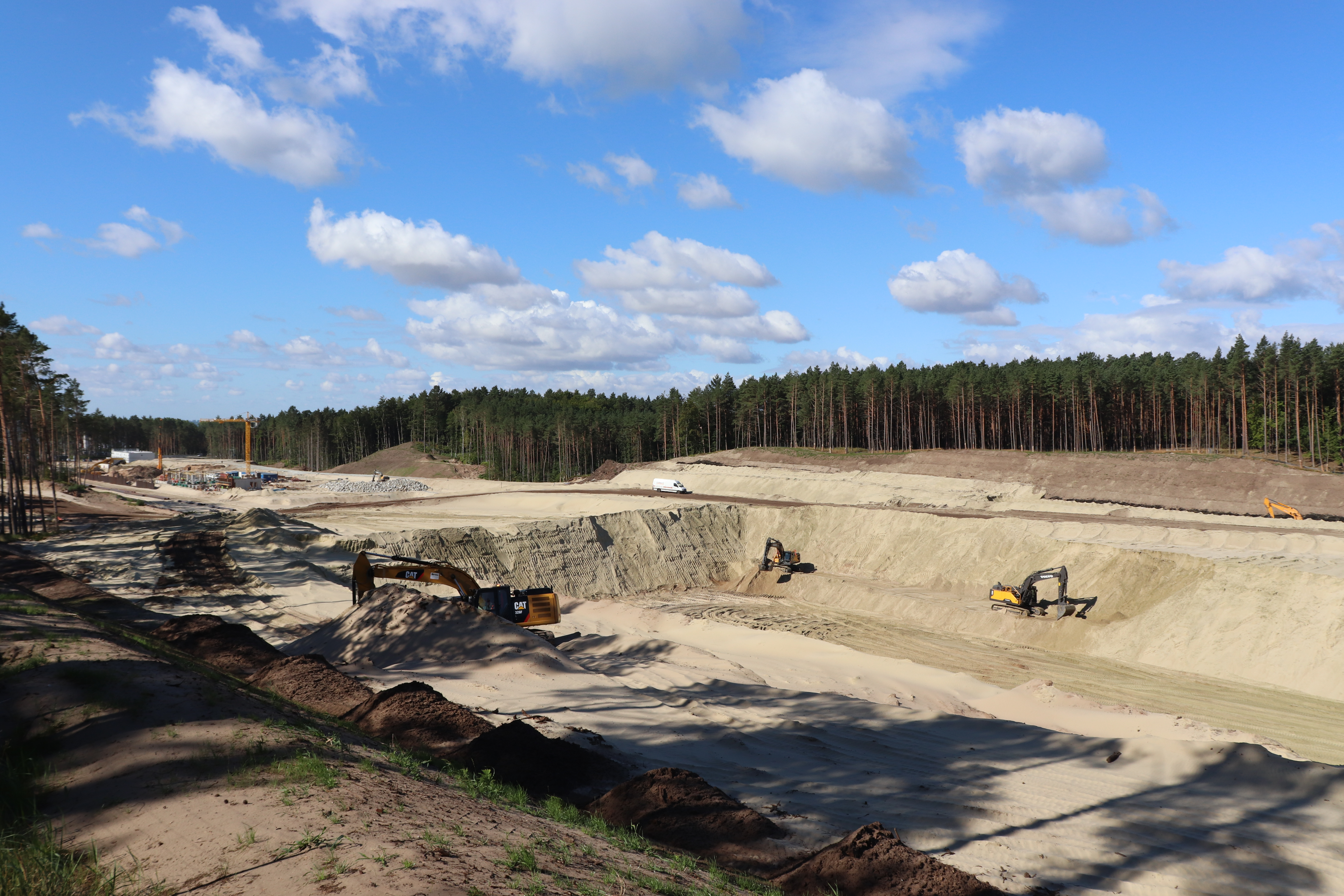 Stand Juli 2020